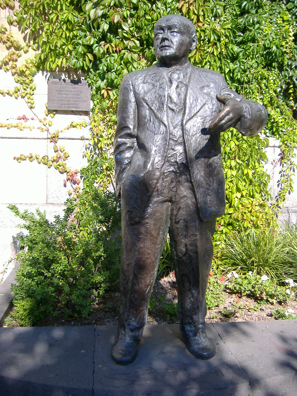 Denkmal für Fritz Steinhoff in Hagen vorm Rathaus, Friedrich-Ebert-Platz